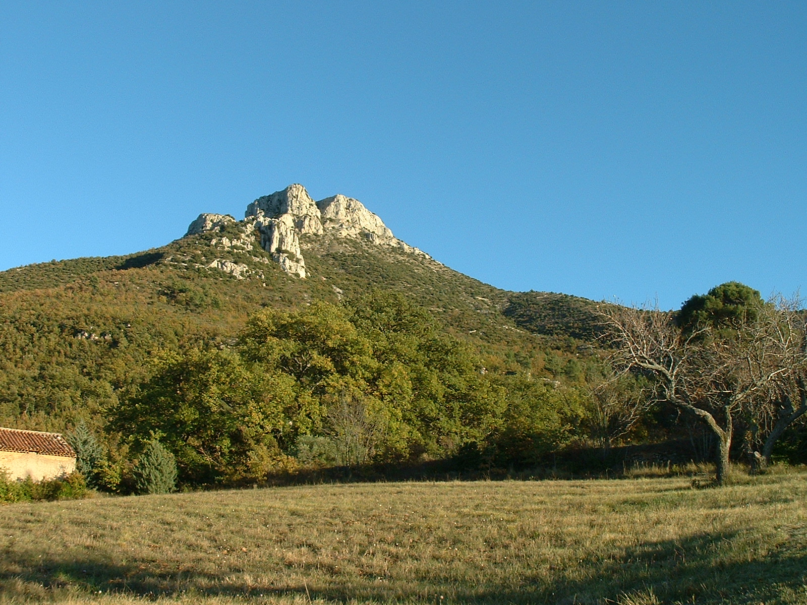 Le Mont Olympe, vue depuis l'ouest (La Boucharde). Photo prise en octobre 2002 par Henri Michelon. (c) 2002 Henri Michelon.